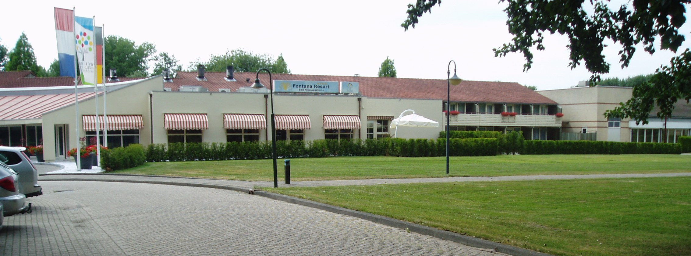 Ingang naar het kuuroord Fontana Bad Nieuweschans in Bad Nieuweschans in de Nederlandse provincie Groningen.